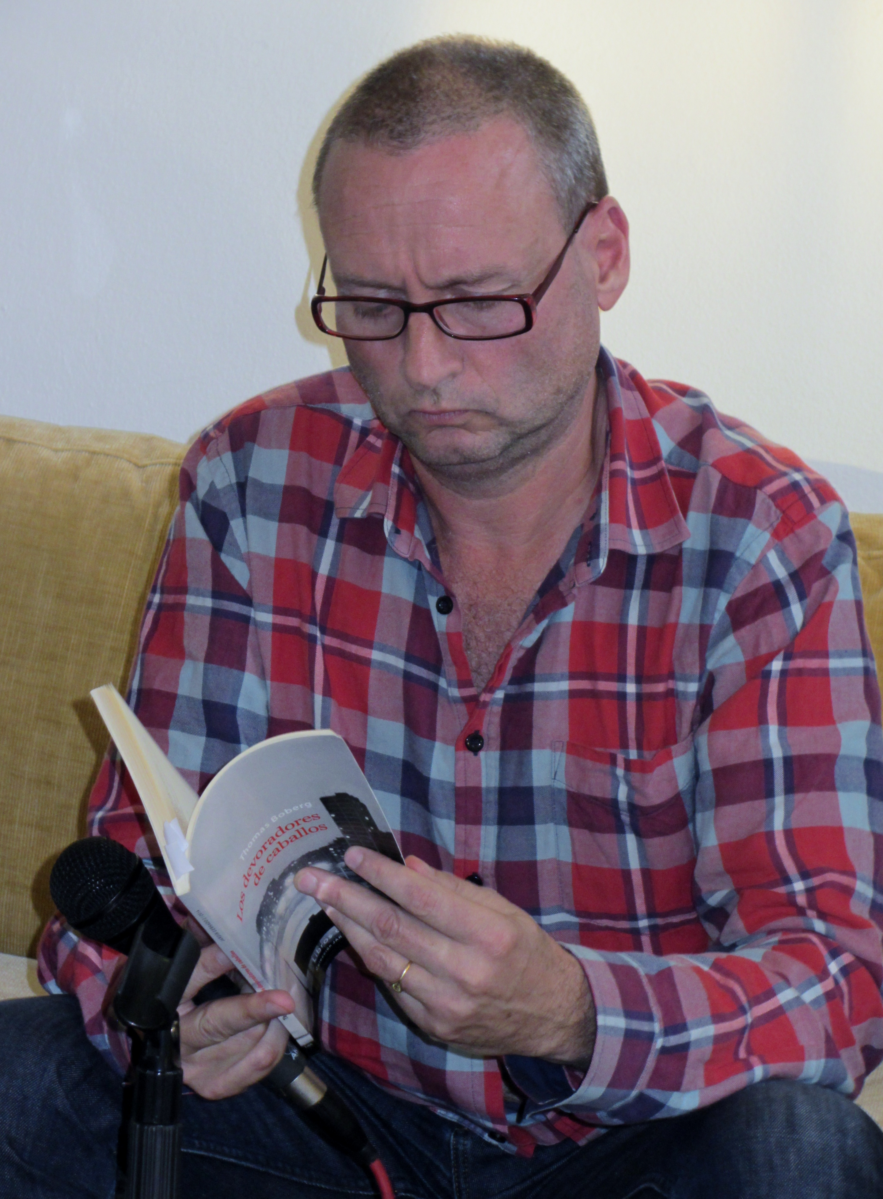 El poeta y escritor de viajes danés Thomas Boberg en la Feria Internacional del Libro de Santiago 2015